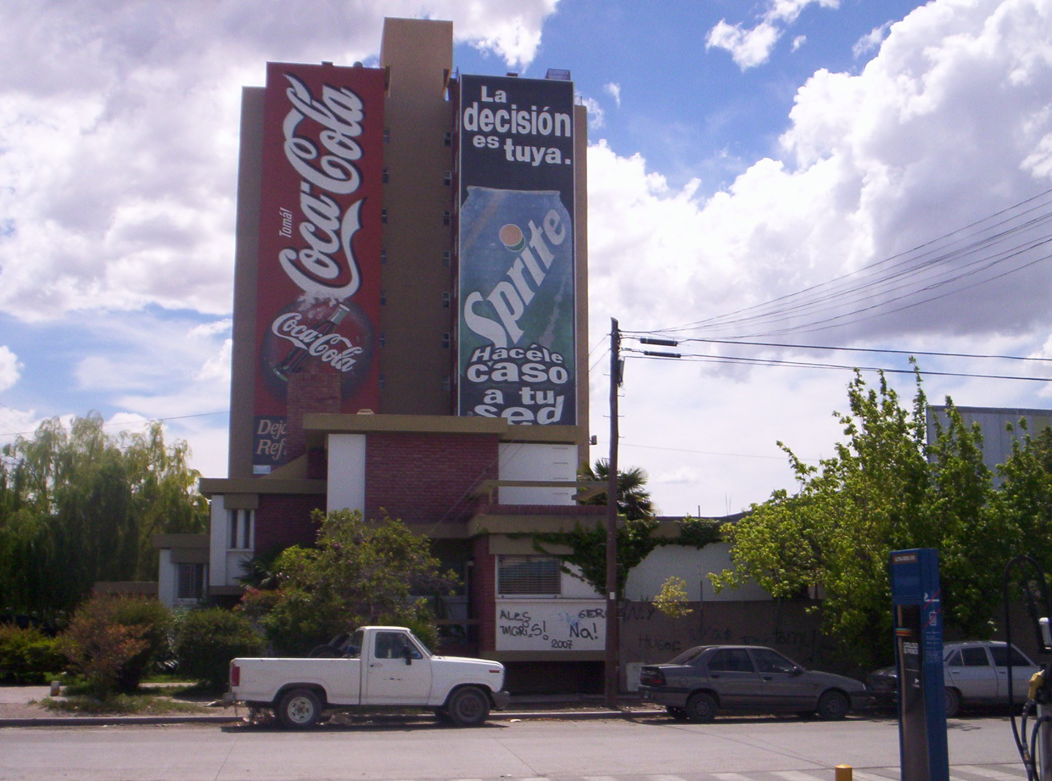 penetracion del voseo en argentina